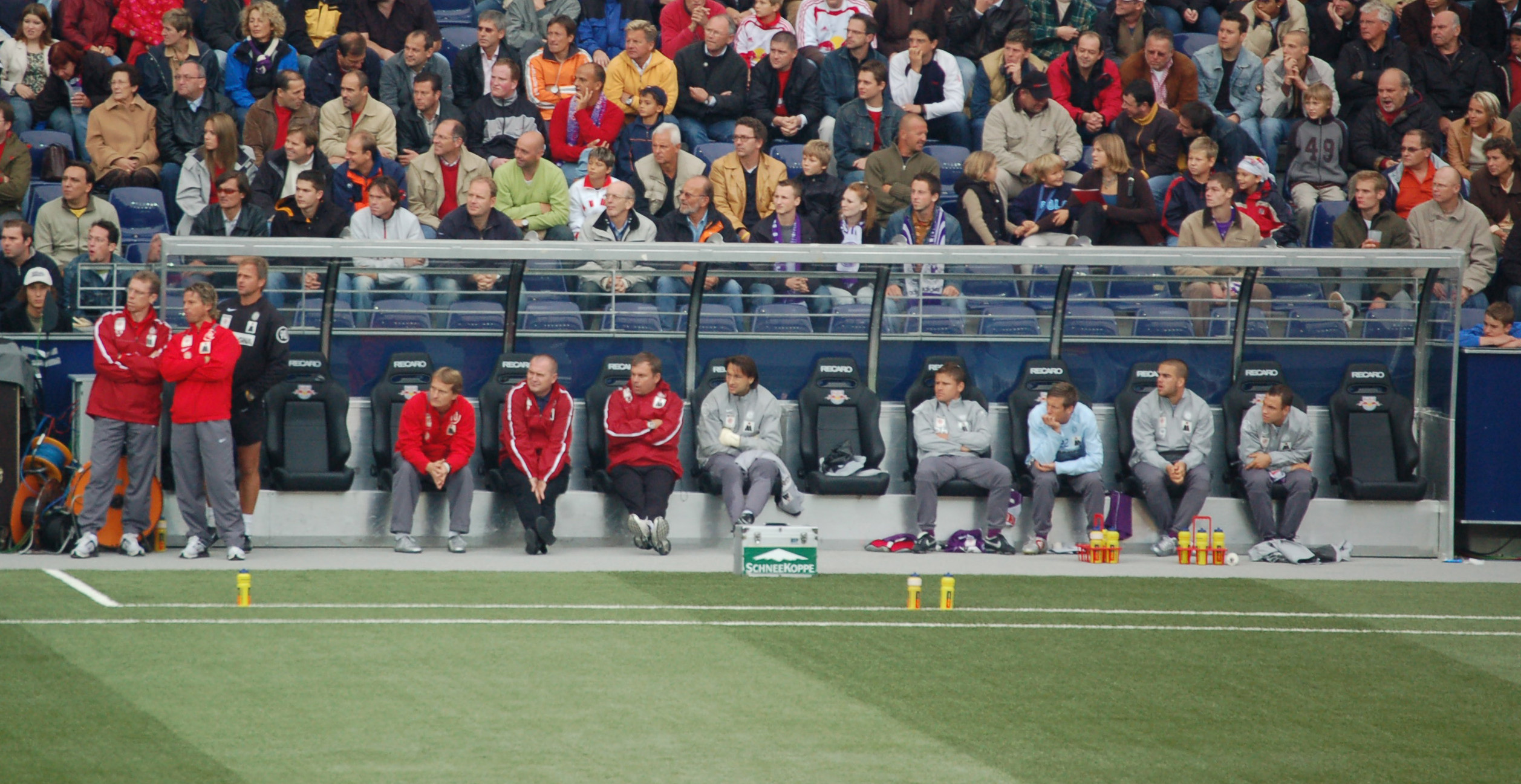 Beide Trainer von Austria Wien (Frankie Schinkels und Peter Stöger) vor der Trainerbank (Red Bull Salzburg vs. Austria Wien in EM-Stadion Wals-Siezenheim